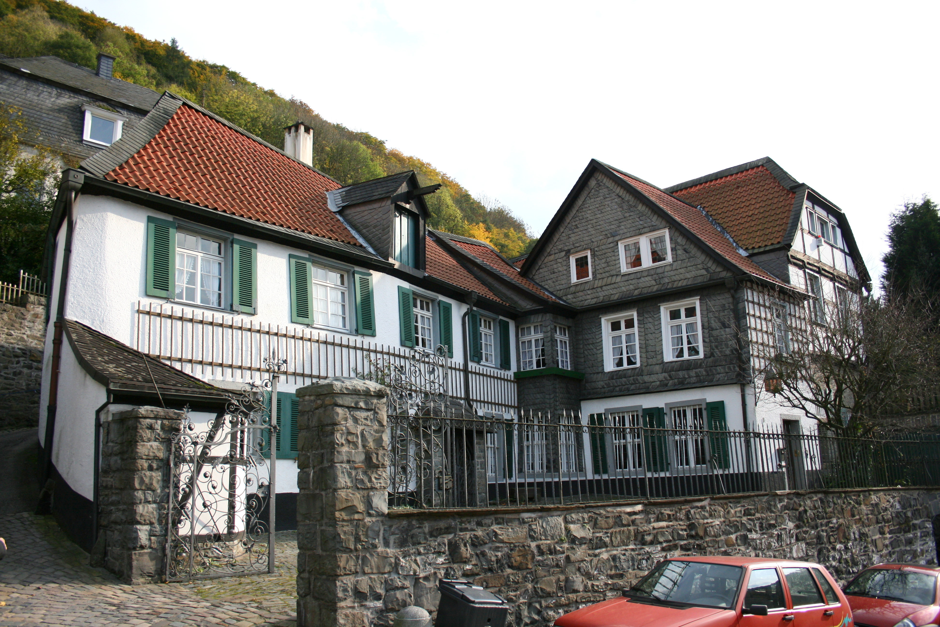 Mückenburg an der Fritz-Thomee-Straße in Altena